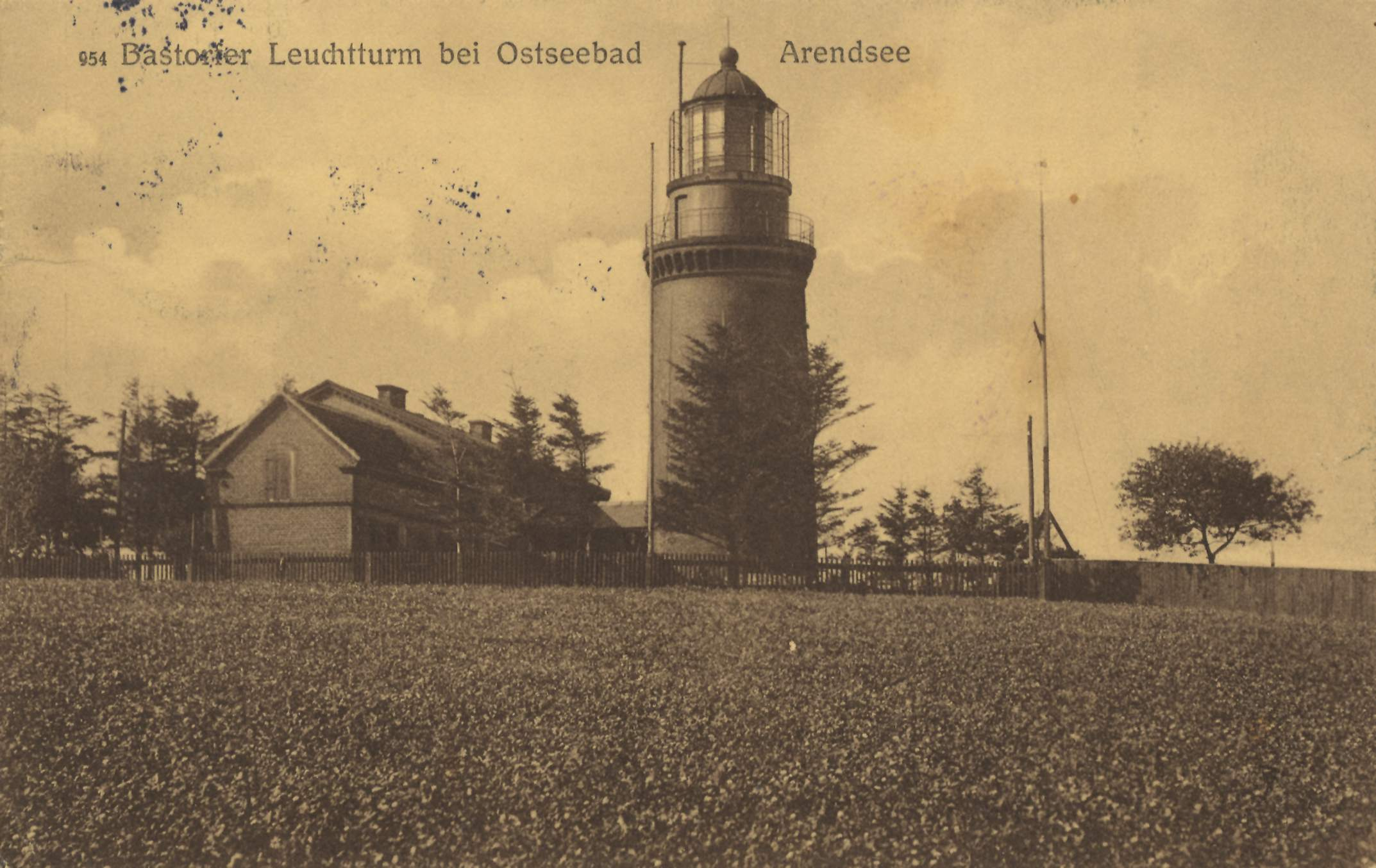 Bastorier Leuchtturm